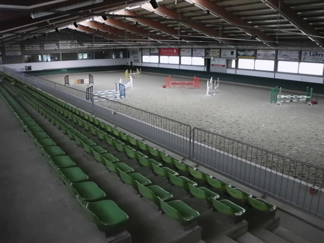 Große Turnierhalle vom AZL